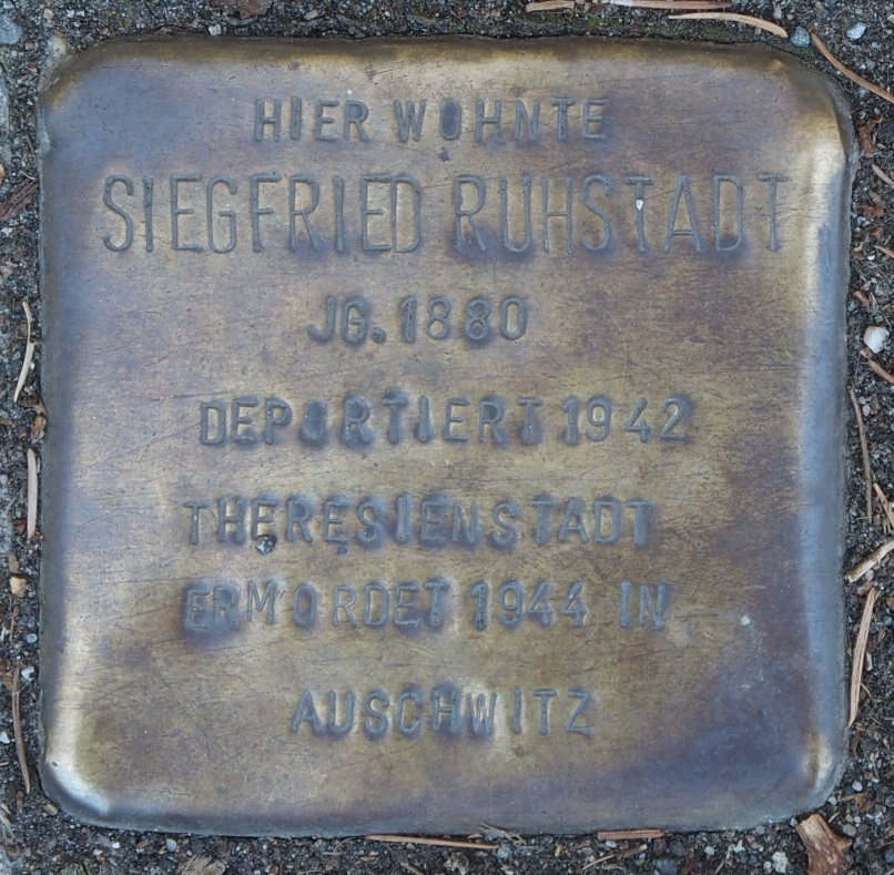 Stolperstein in Soest Westenhellweg 2-4, Siegfried Ruhstadt